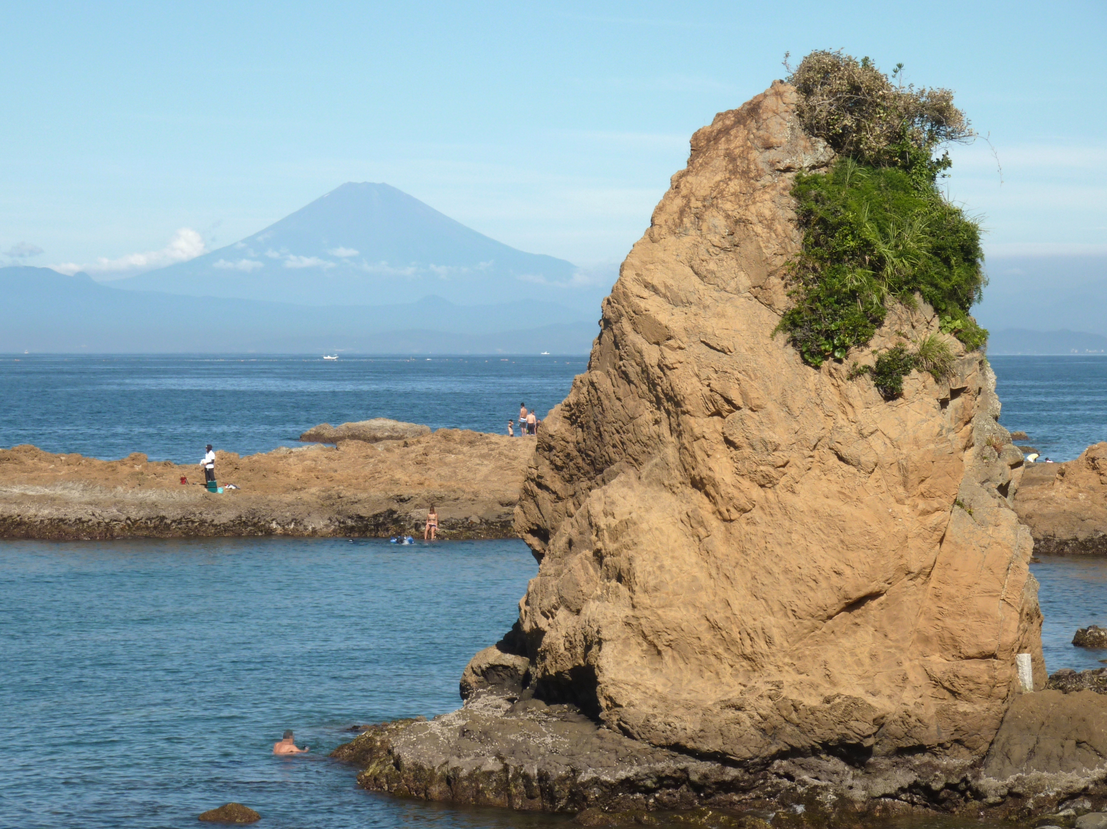 立石と富士山(神奈川県横須賀市)